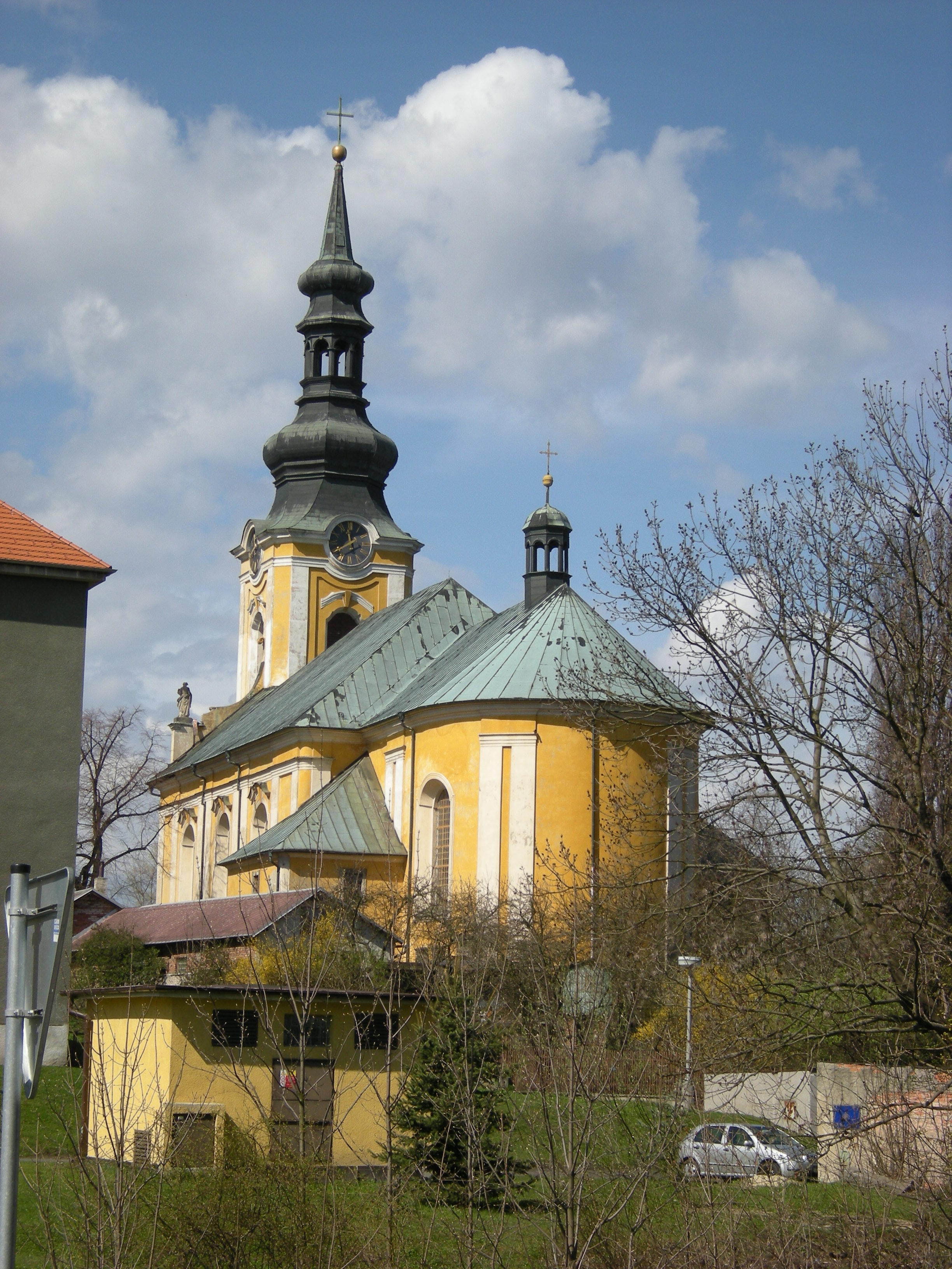 Děkanský katolický kostel sv. Petra a Pavla ve Varnsdorfu (okres Děčín)